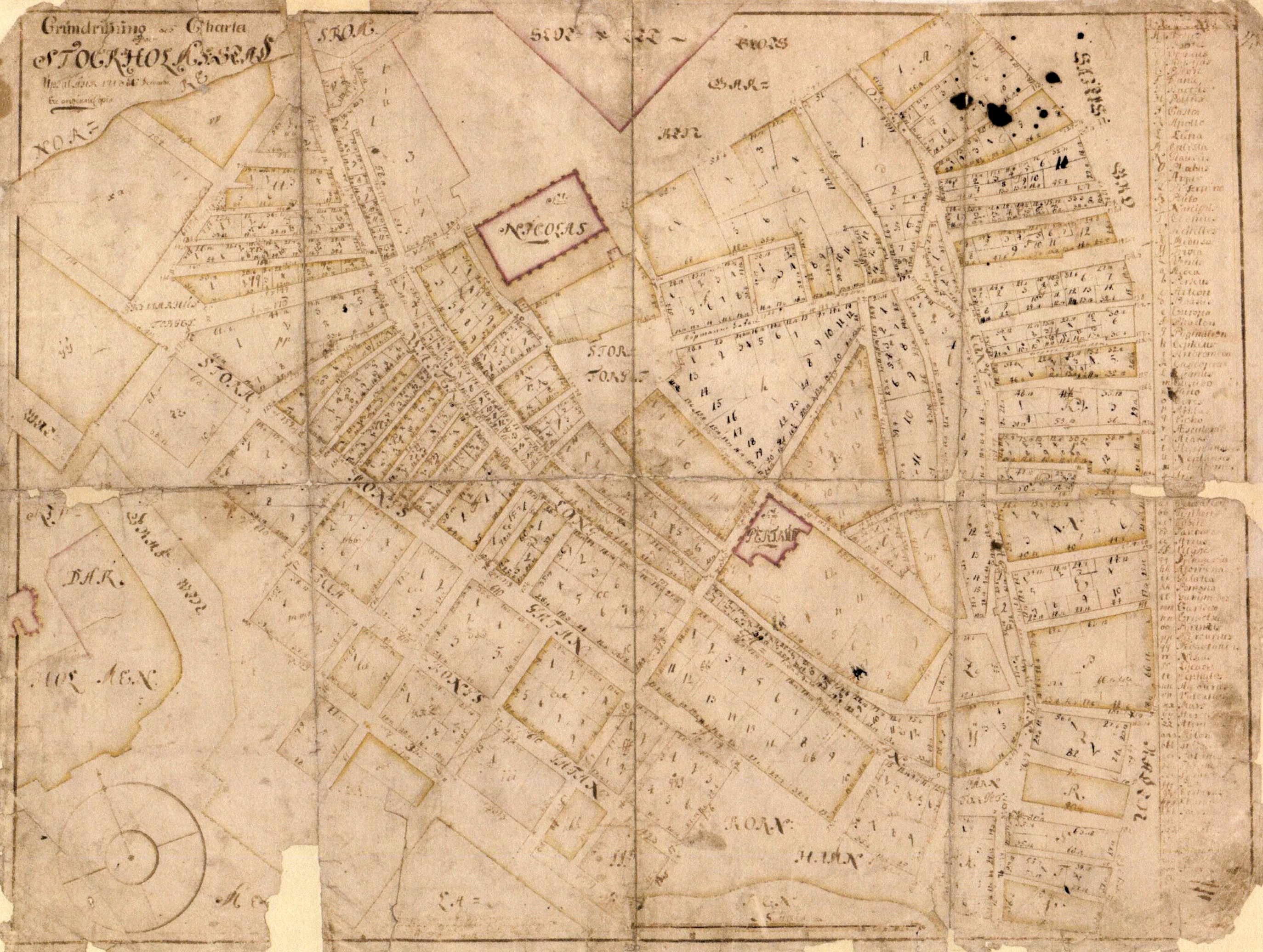 "Grundritning och Charta Stockholm Stad"